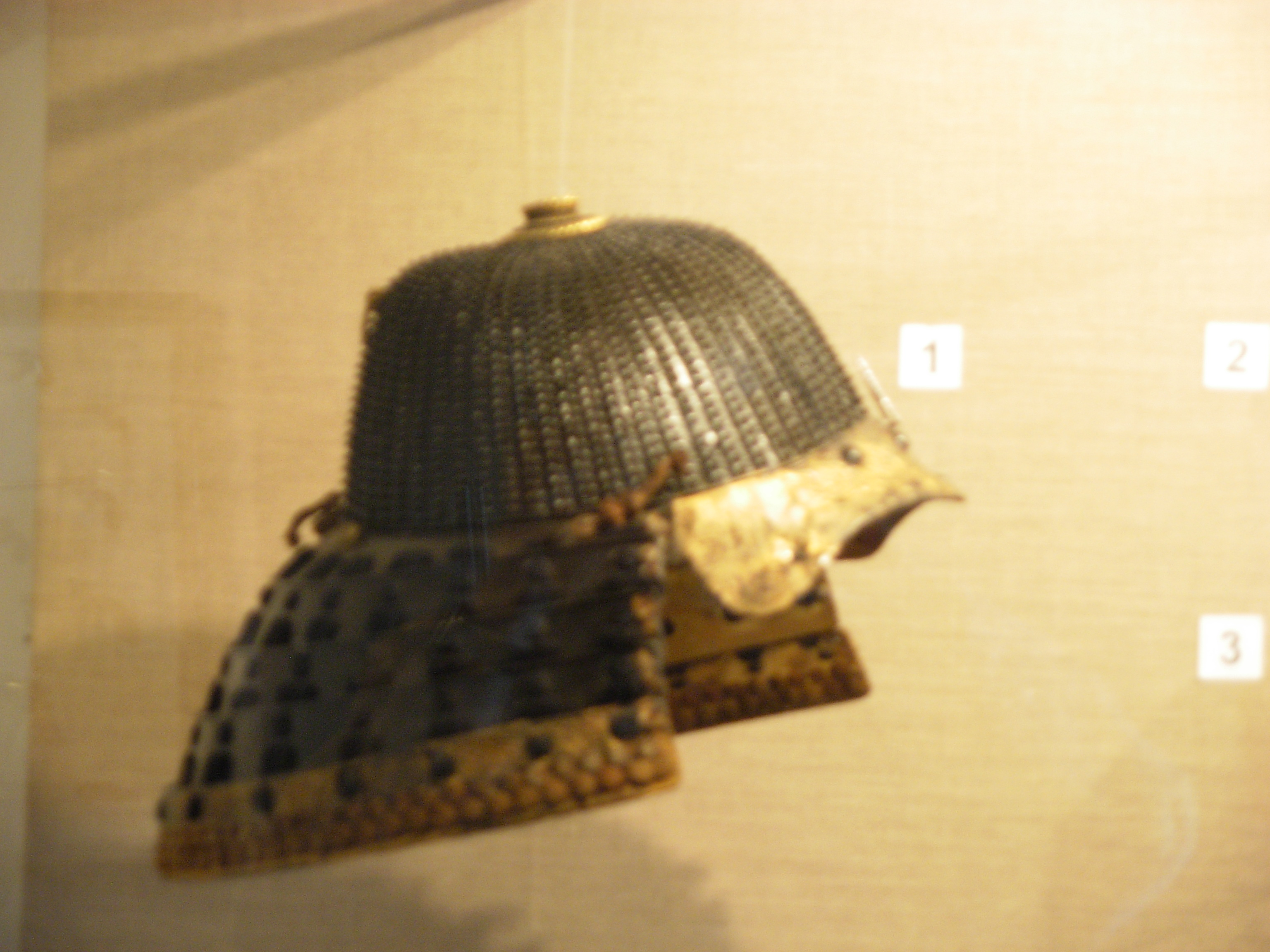 Items from Muzeum Zagłębia, in Castle in Będzin, Poland.